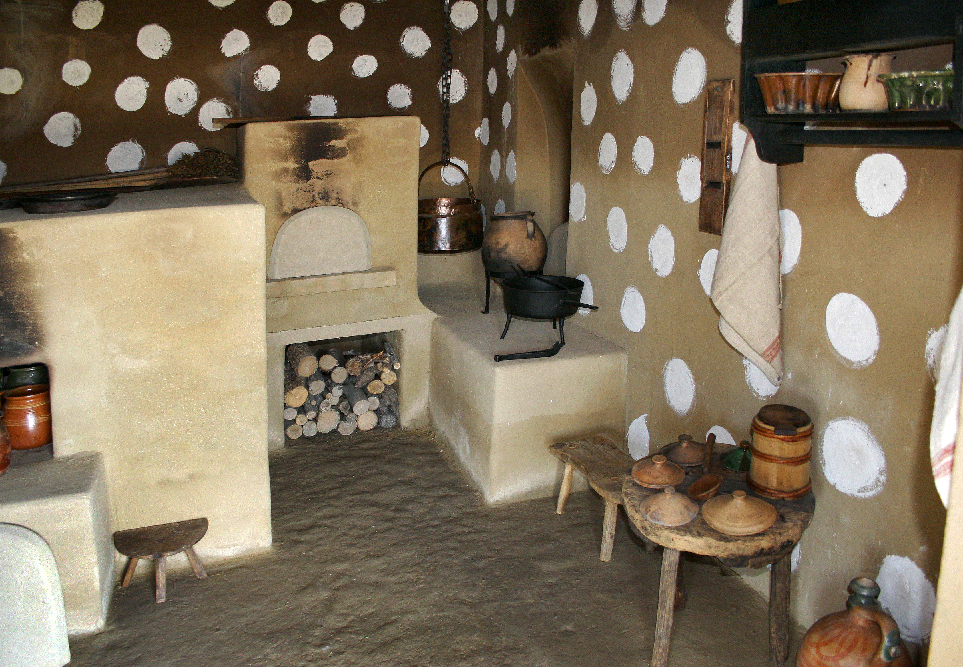 Skanzen, Nyugat-Dunántúl, Zádori lakóház